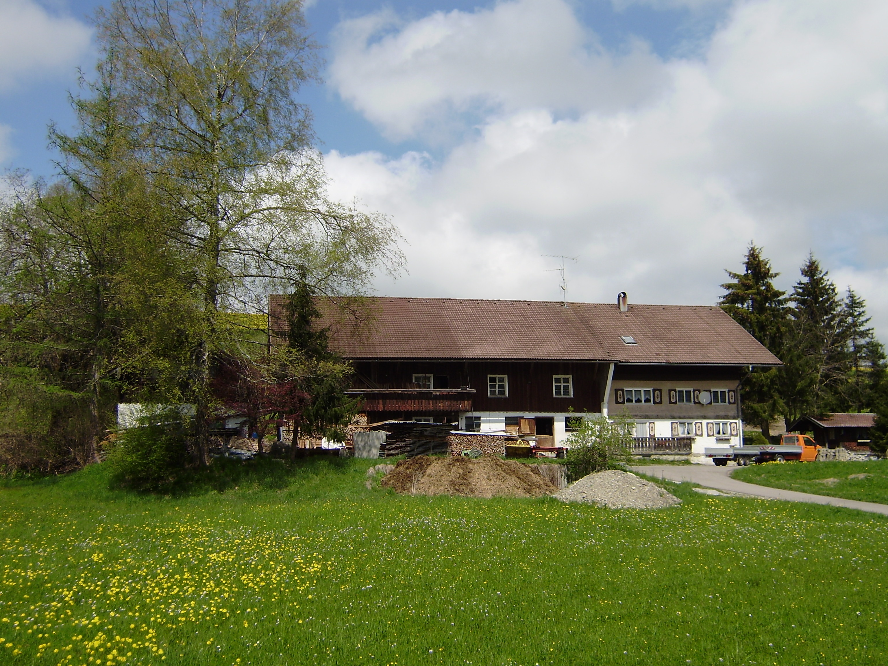 Der Bauernhof Aichele-Moos in Stiefenhofen im Westallgäu, Bayern, Germany. Hier lebte das Mädchen Gabriele Schwarz-Eckart von 1937 bis 1943 bei ihren Pflegeeltern, bis es im KZ Auschwitz umgebracht wurde.